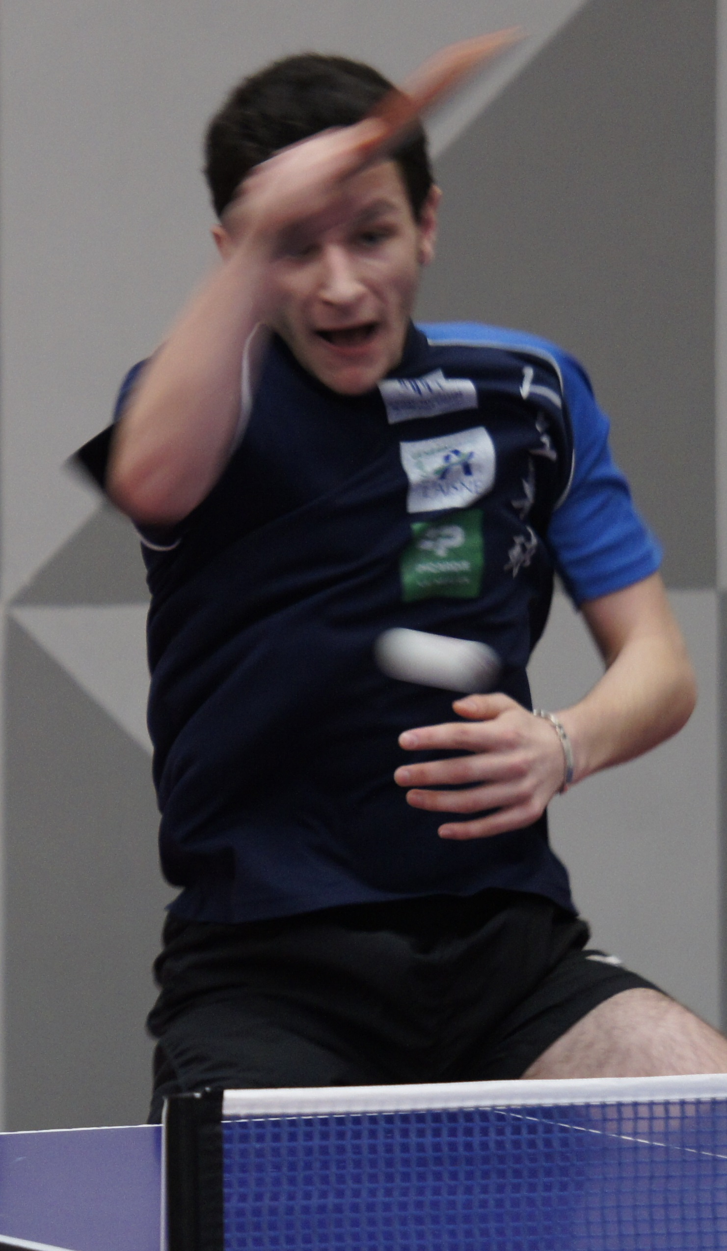 Joueurs lors du tournois de Chalons .